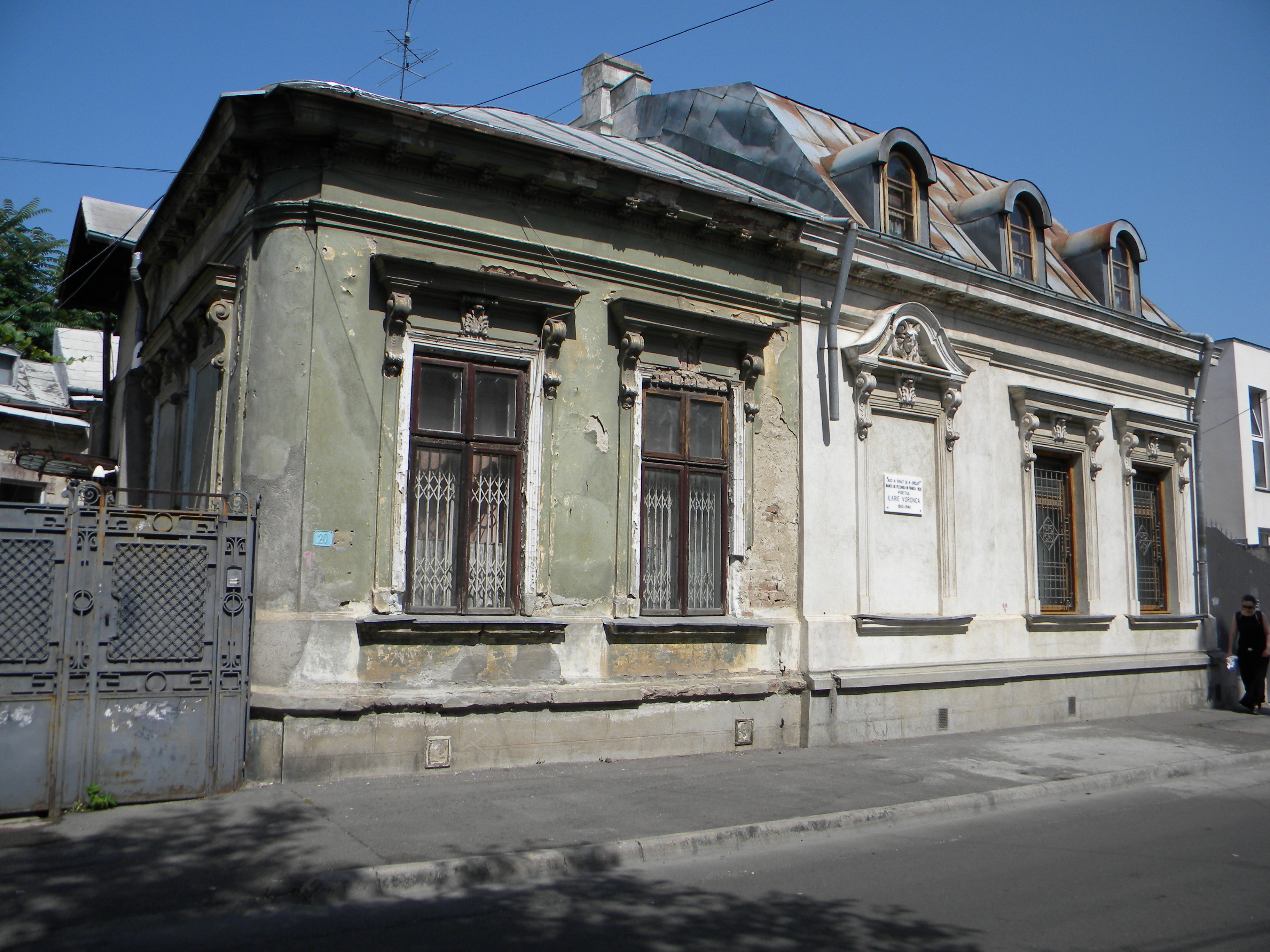 Bucuresti, Romania, Casa ILARIE VORONCA, Str. Parfumului nr. 20; B-II-m-B-19339